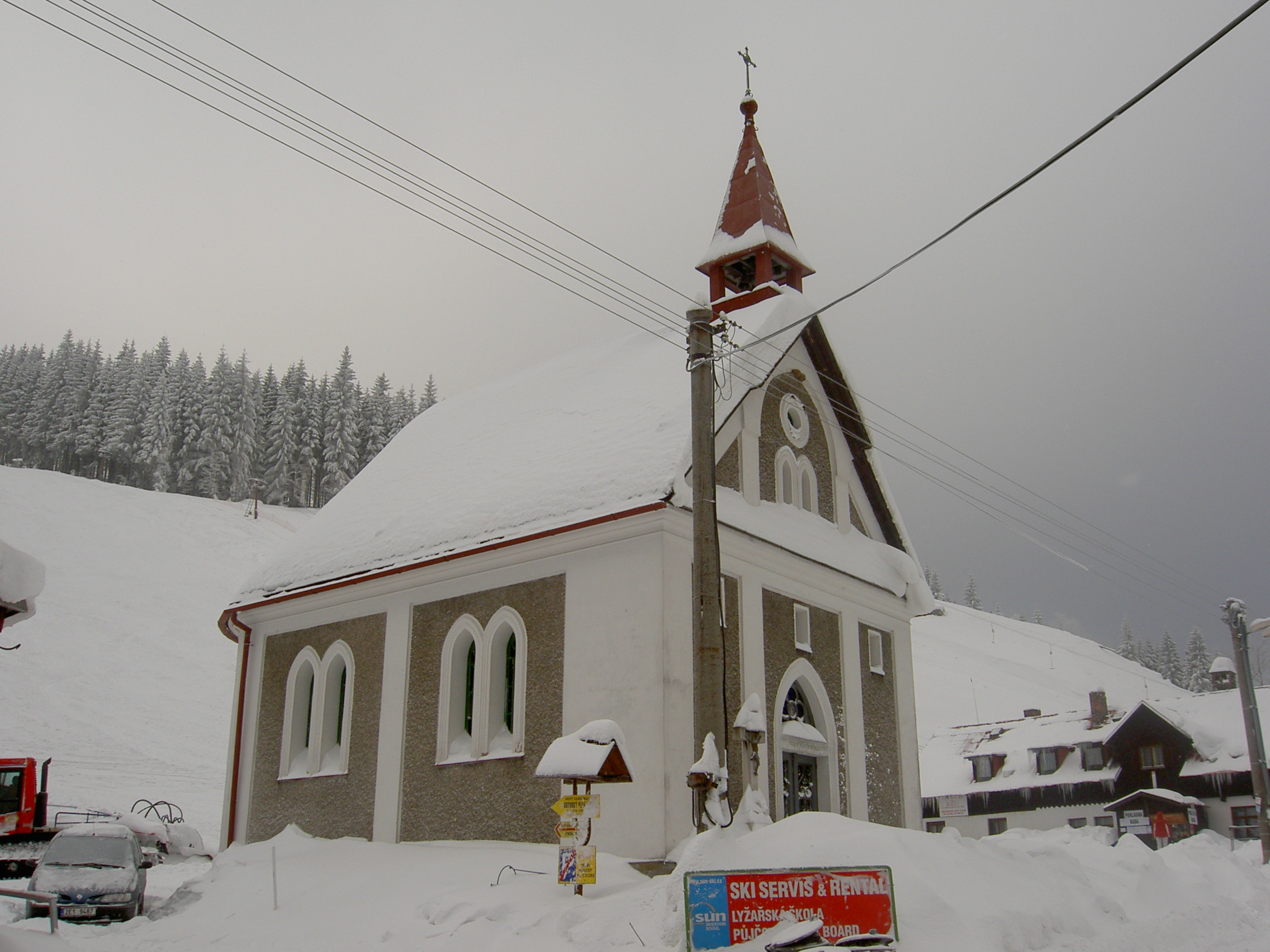 Petříkov, část obce Ostružná